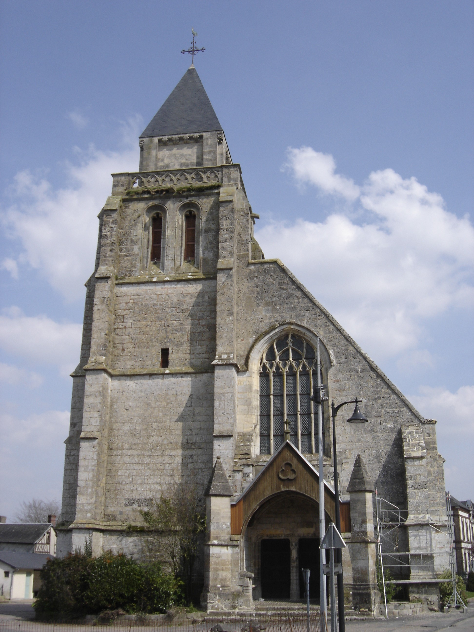 Eglise d'Epaignes - Eure - France